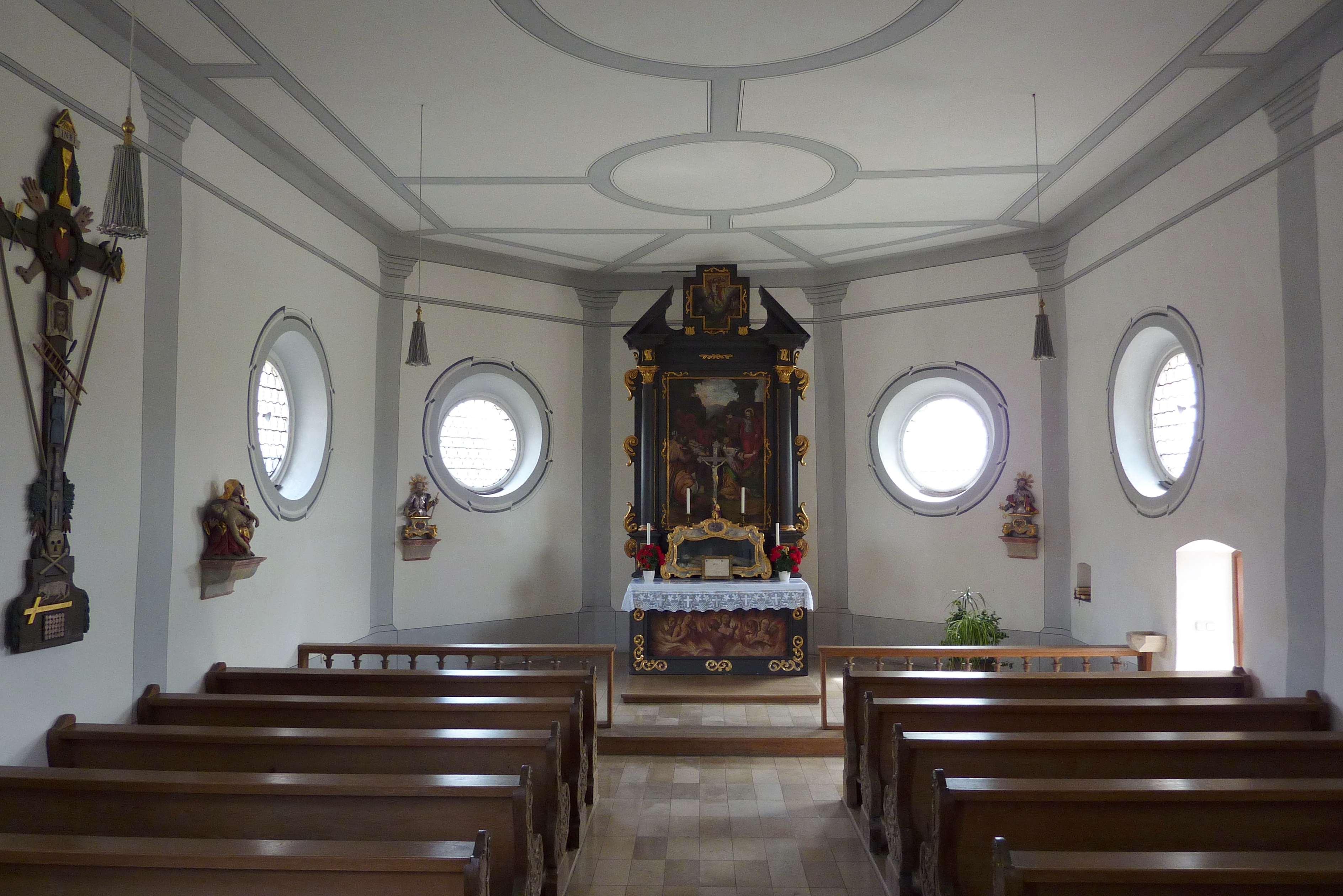 katholische Friedhofskapelle in Bissingen im Landkreis Dillingen an der Donau (Bayern), 1. Hälfte 17. Jahrhundert